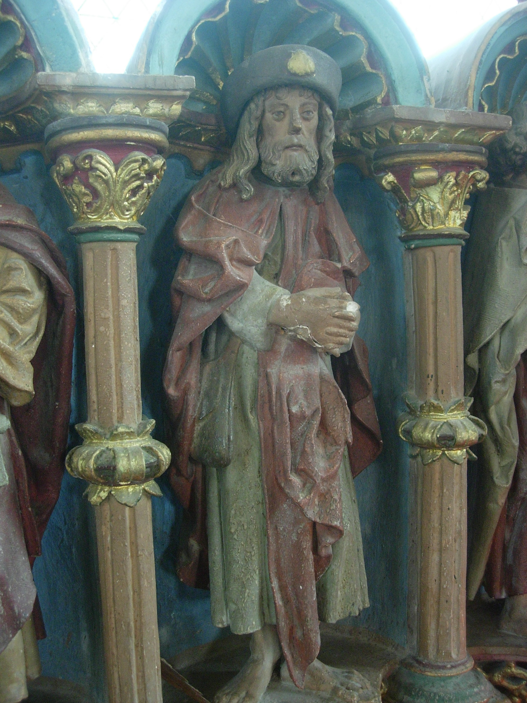 Marigny-le-Châtel : détail du retable du XVIème